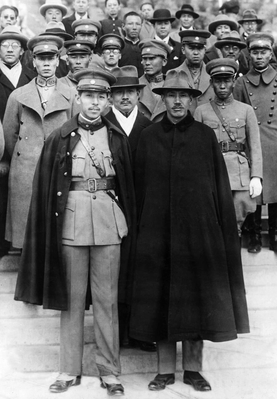 中山陵を参拝する張学良と蒋介石